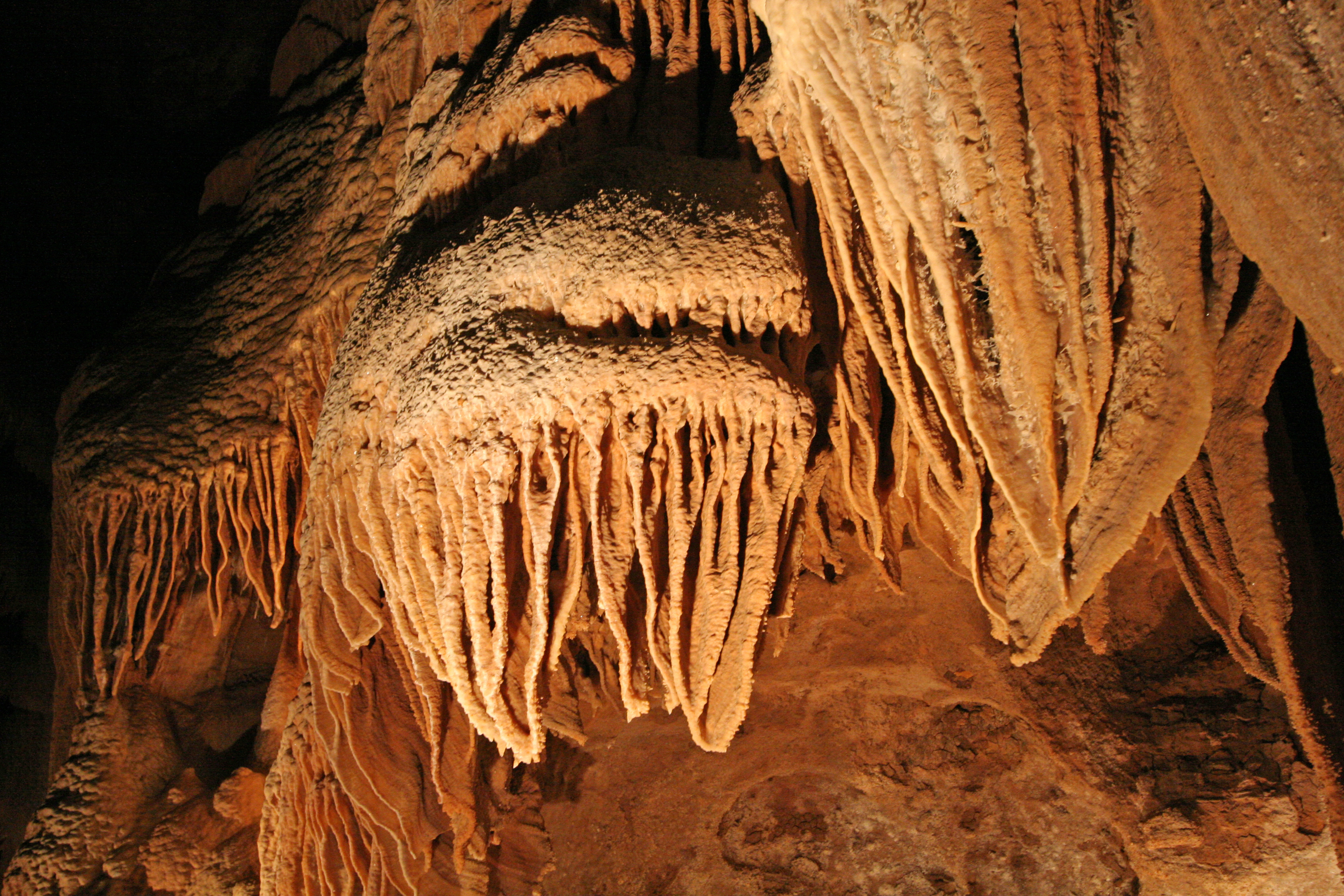 Grotte de la Madeleine